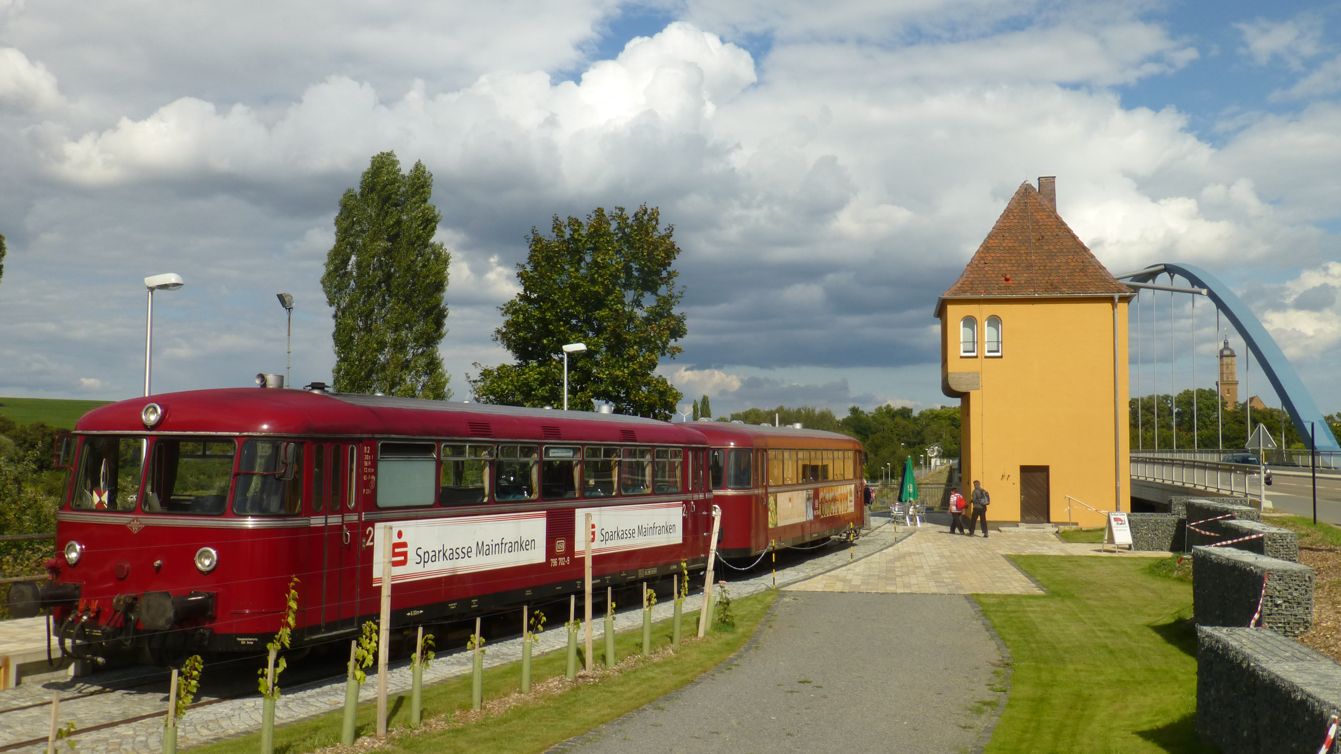 Schienenbus am neuen Astheimer Haltepunkt. Rechts das 1959 gebaute, ehemalige Schrankenwärterhaus.